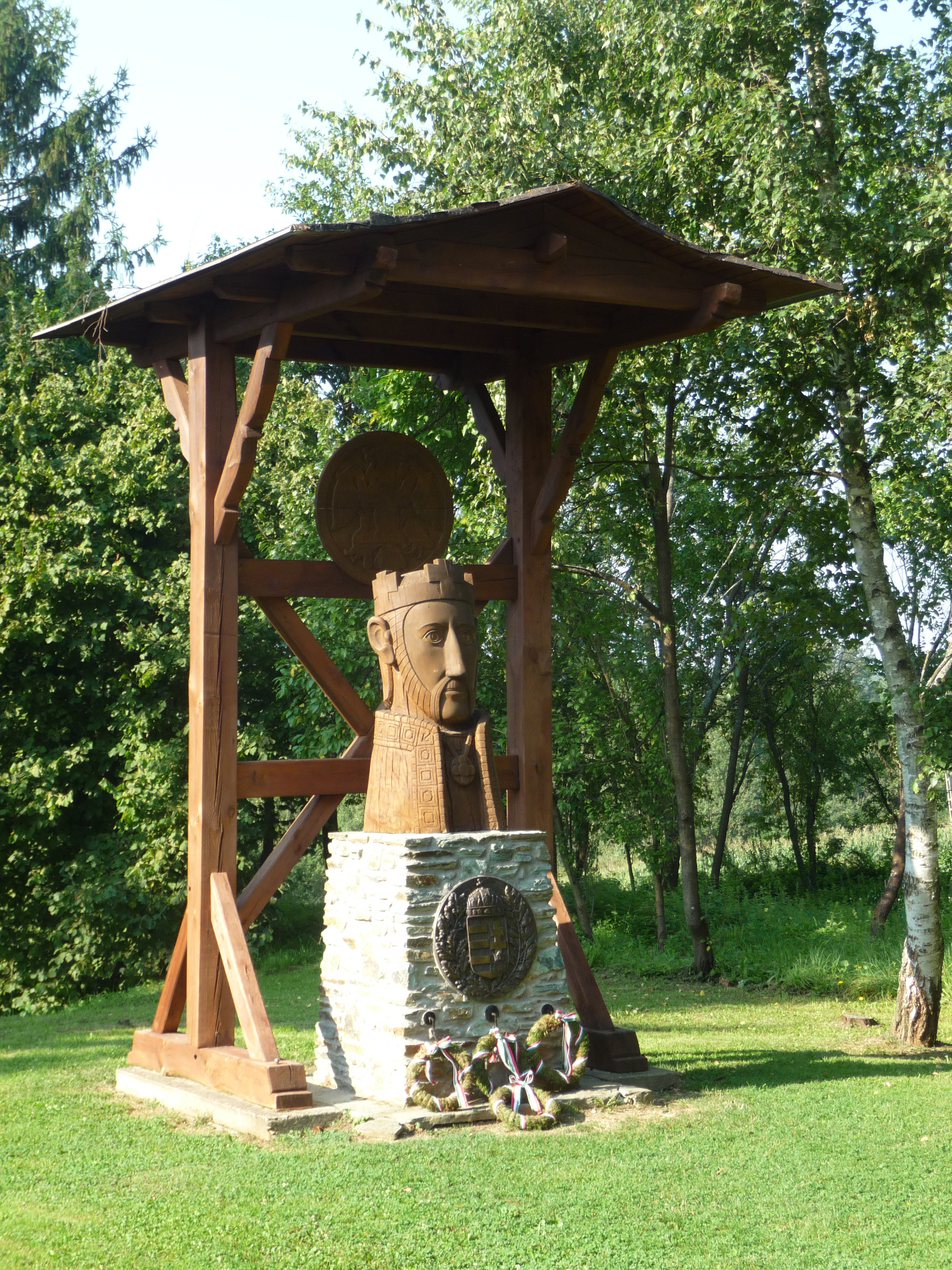 Fából faragott Szent István-mellszobor Szent Péter-templomhoz vezető bekötő út mellett, Őriszentpéter